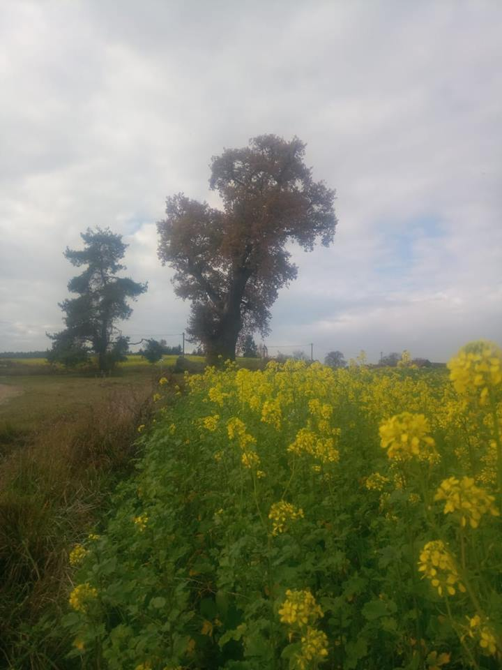 Boarisch: De dausndjahrige Eichn in Gollingkreit